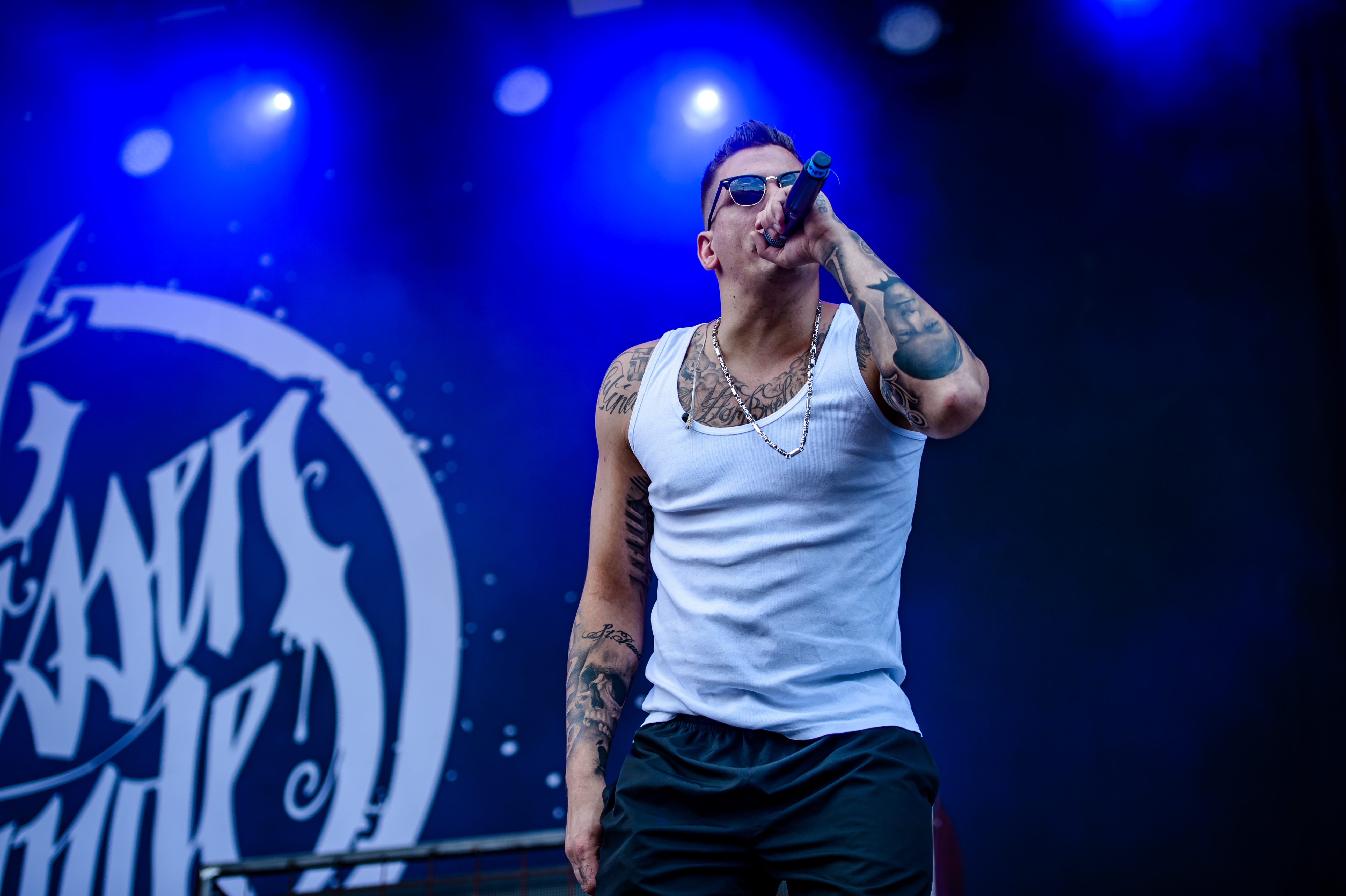 'Rock im Park 2017; Nürnberg': '187 Straßenbande'